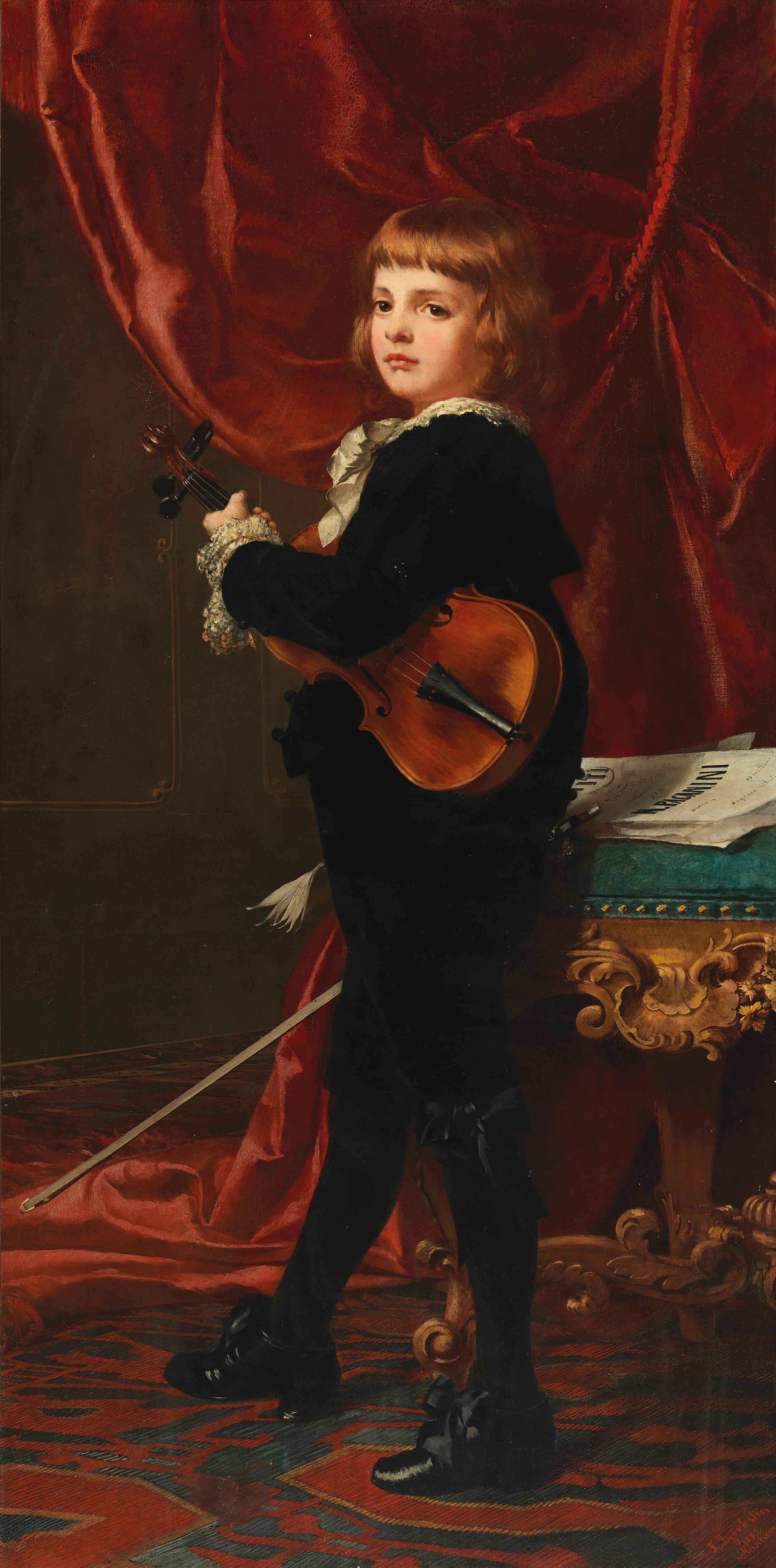 Portrait eines jungen Geigers, signiert, bezeichnet, datiert F. Björkstén München 1885, Öl auf Leinwand, 140 x 71 cm